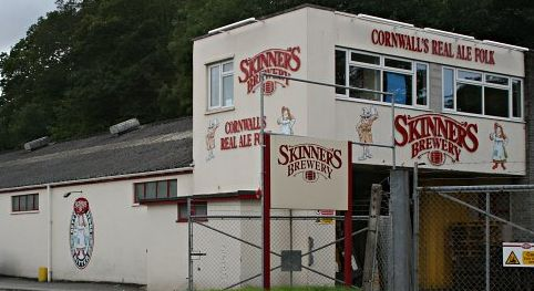 Skinner's Brewery